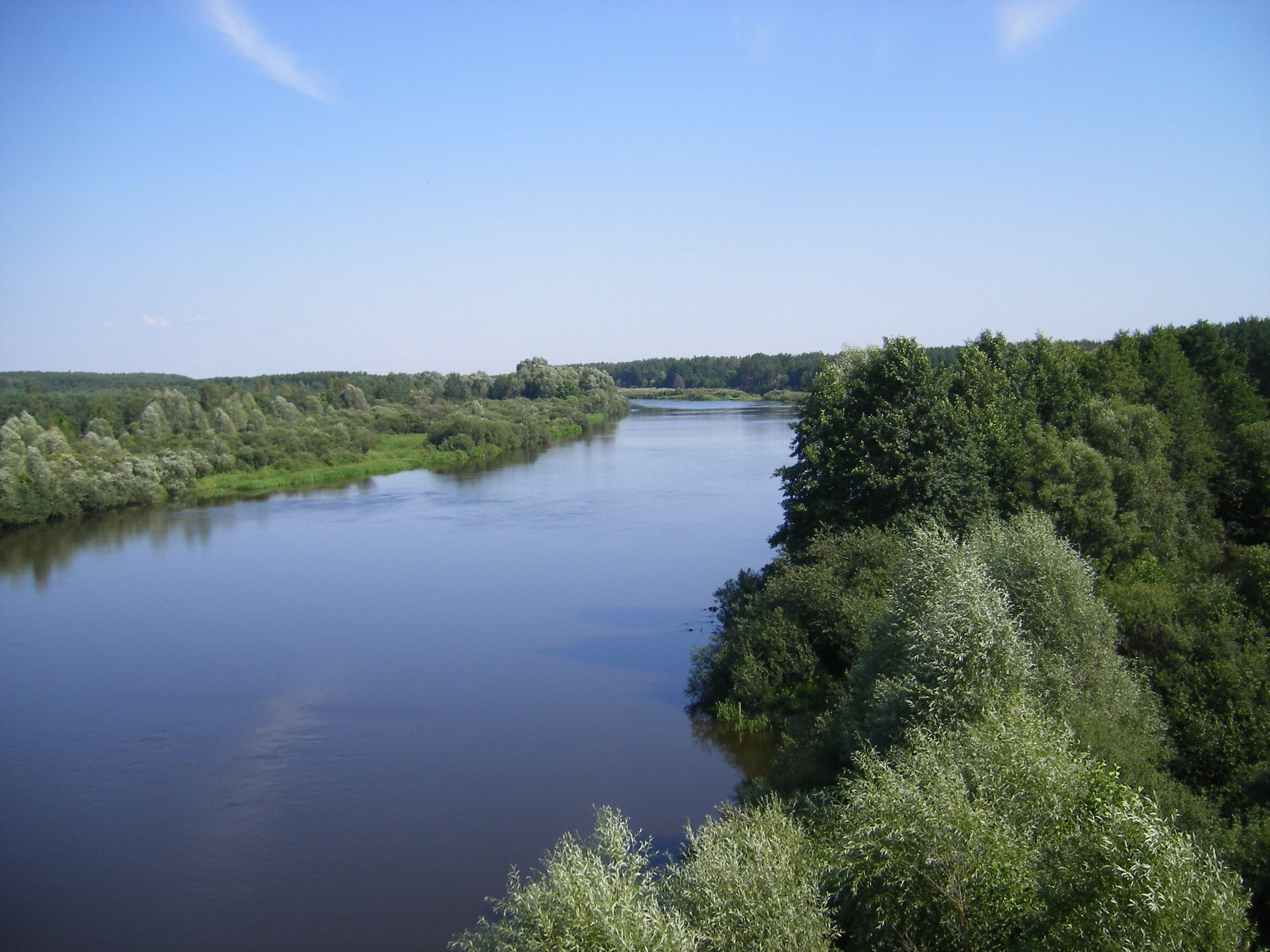 Neman river near Byarozavka (Бярозаўка), Belarus